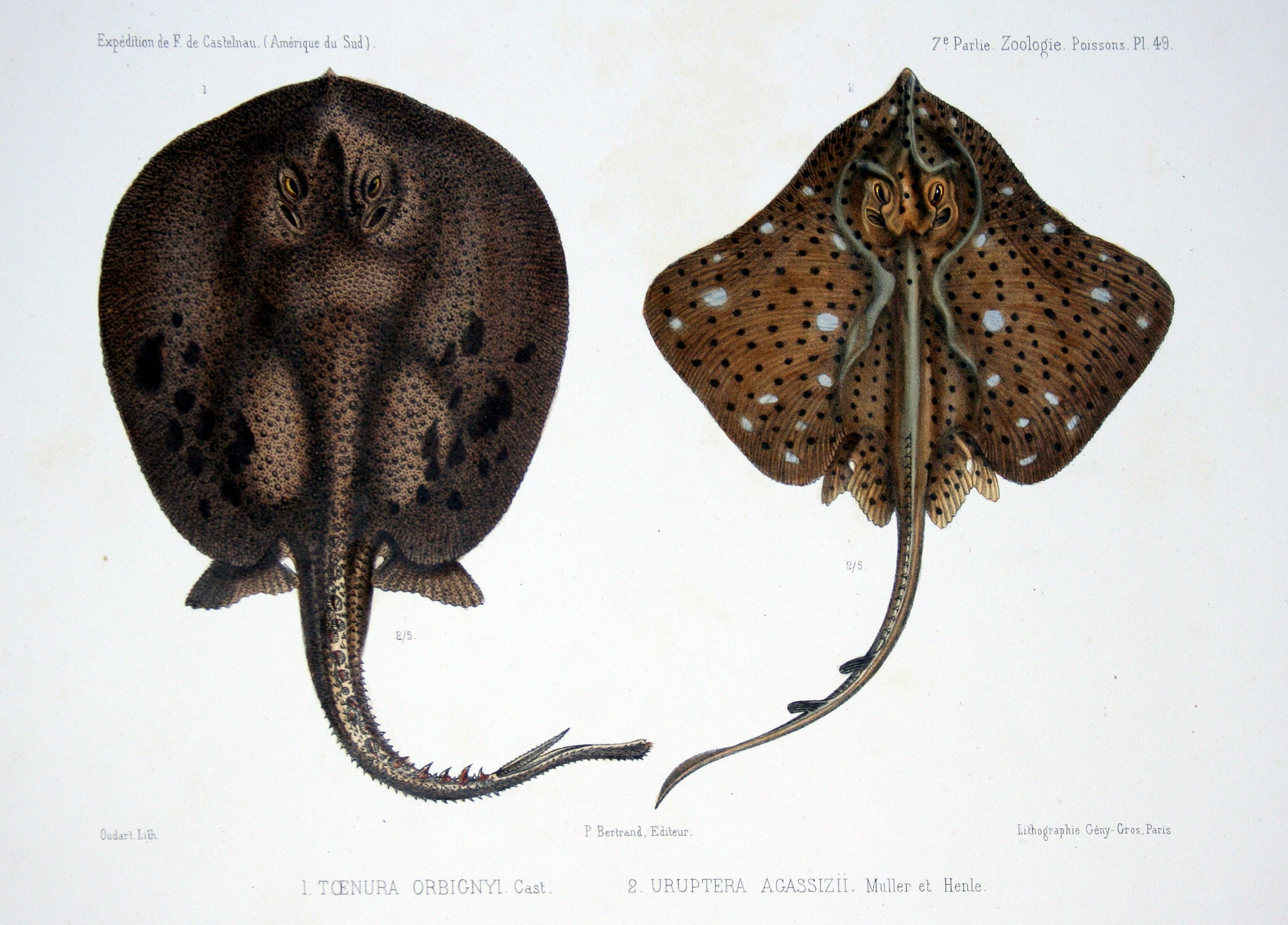 Tœnura orbignyi = Potamotrygon orbignyi (left) Uruptera agassizii = Rioraja agassizii (right)